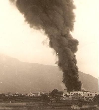 Imagen de Archivo del Incendio del Convento de San Agustín.